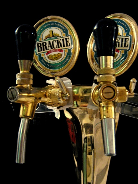 Nalewaki Brackiego z Brackiego Browaru Zamkowego w Cieszynie